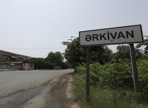 jkççççç